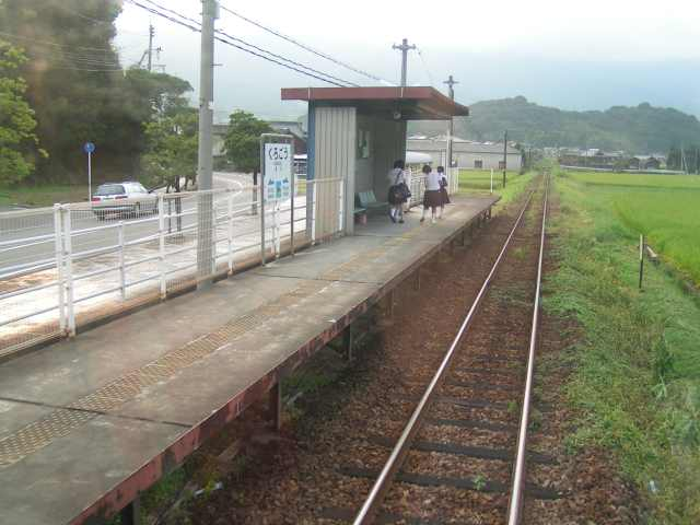 黒川駅 投稿者が撮影(2006/08/28)